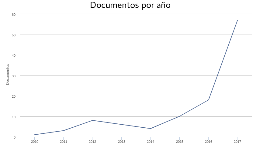 Producción científica de la UTE según Scopus